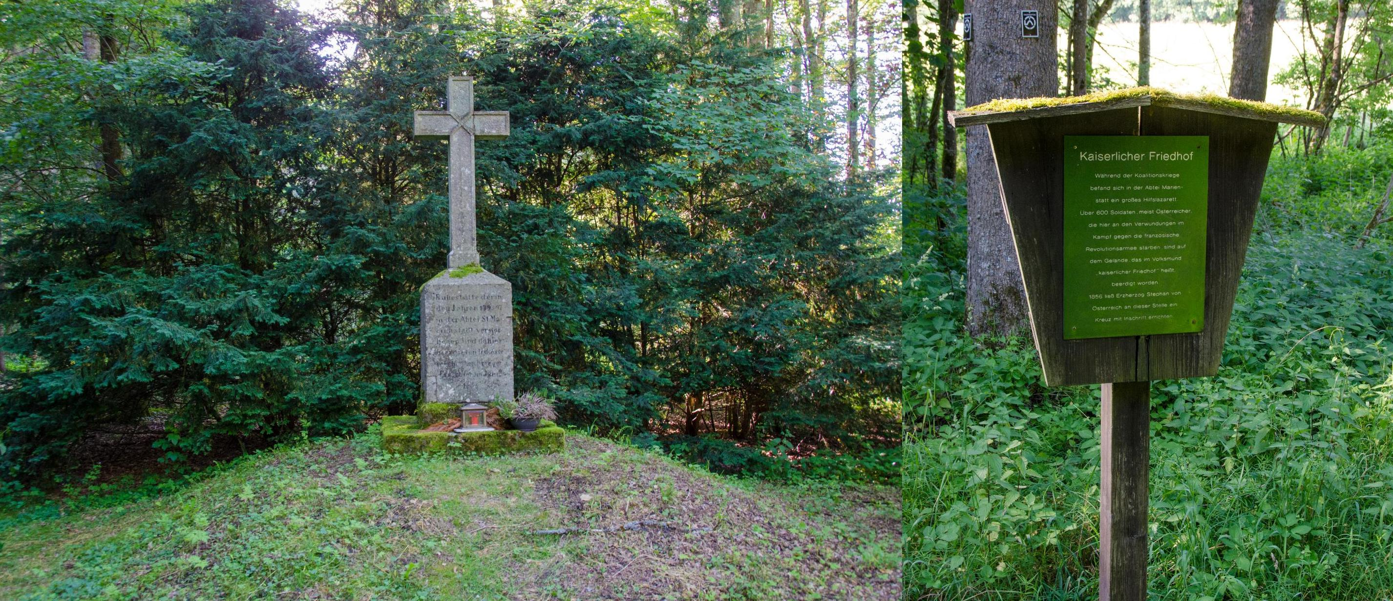 Steinkreuz am "Kaiserlichen Friedhof" bei Marienstatt für über 600 österreichische Soldaten, die in den Koalitionskriegen verwundet wurden und im Lazarett des Klosters Marienstatt starben. Inschrift: Ruhestätte der in den Jahren 1793-97 in der Abtei St. Marienstadt verstorbenen und dahier beerdigten K.K. österreichischen Krieger. Errichtet im Jahre 1856